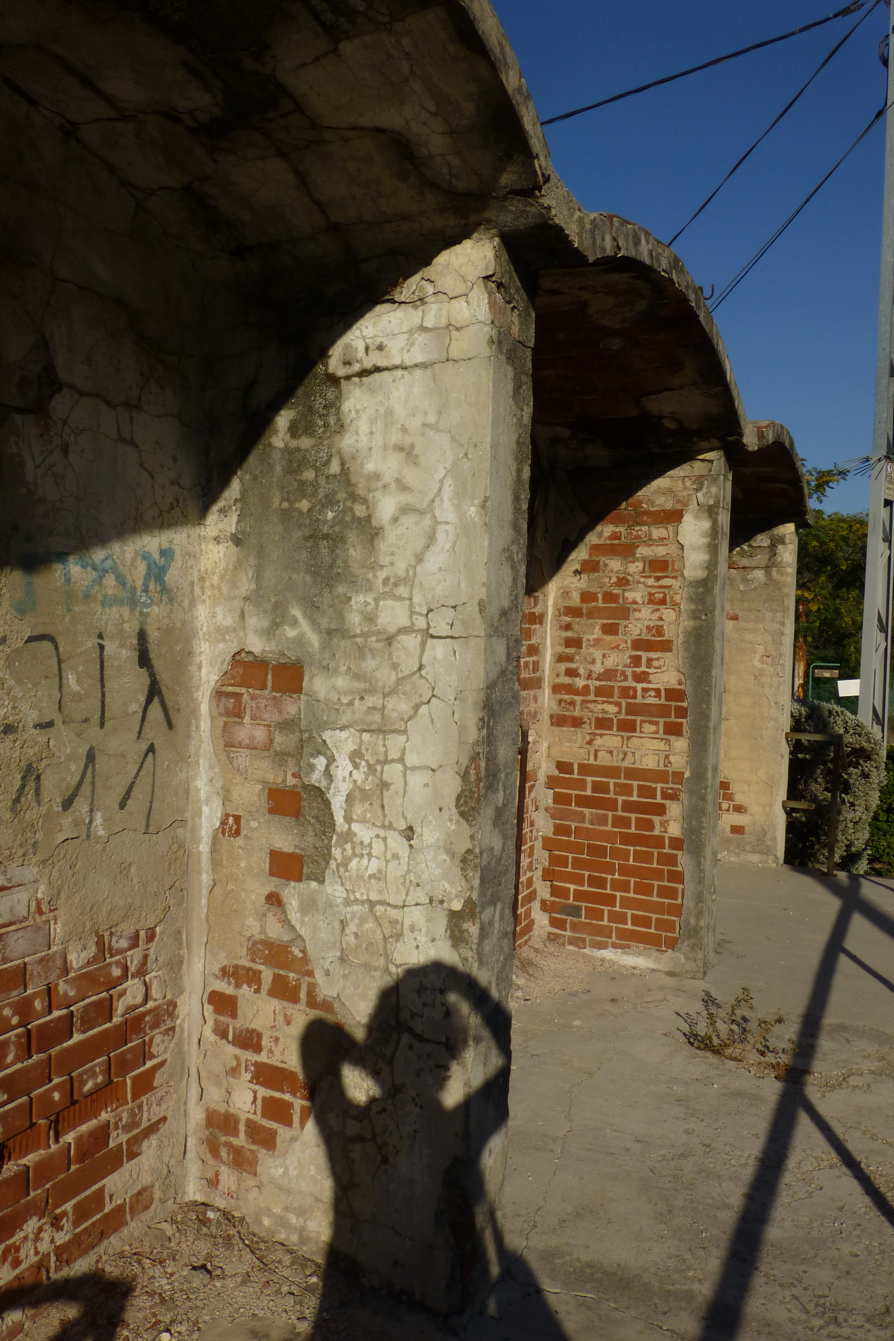 בית הקירור שימש את איכרי הכפר לאיחסון תפוחי אדמה שגידלו. הקיבולת היתה: 80 טון. בהמשך הושכר בית הקירור לשימושם של קיבוצי הסביבה תמורת תשלום. בימי מלחמת השחרור שימוש המקום לאיחסון נשק. בית הקירור אמור לעבור תהליך שימור ולהכיל בתוכו את ארכיון הישוב.